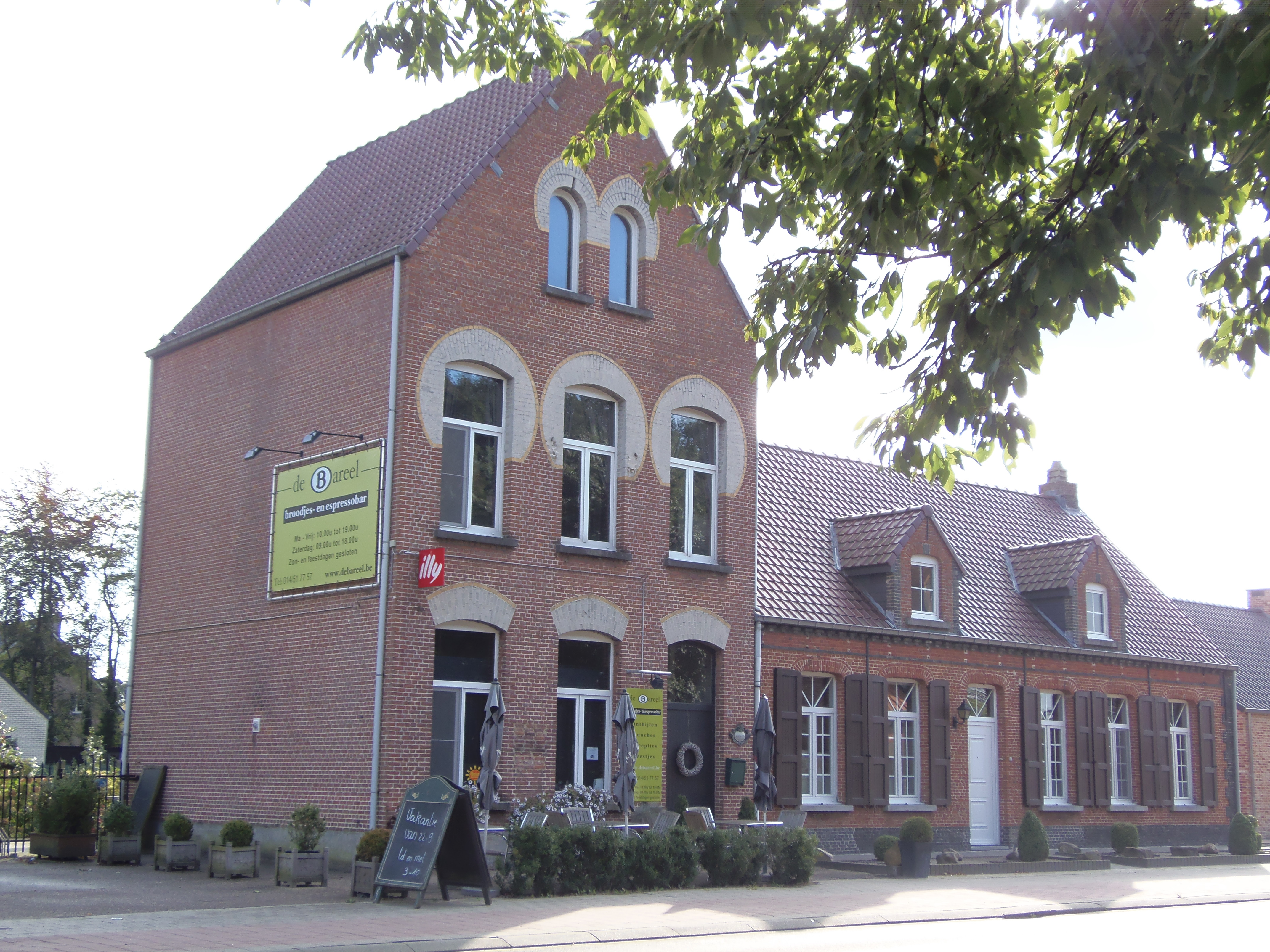 Bouwel (Grobbendonk), Herenthoutsesteenweg 4 en 6. Rechts (nr. 6) het voormalig postkantoor uit 1869, na de bouw van het nieuwe postkantoor de woning van de postmeester. Links (nr. 4) het nieuwe postkantoor uit 1904, thans broodjesbar.